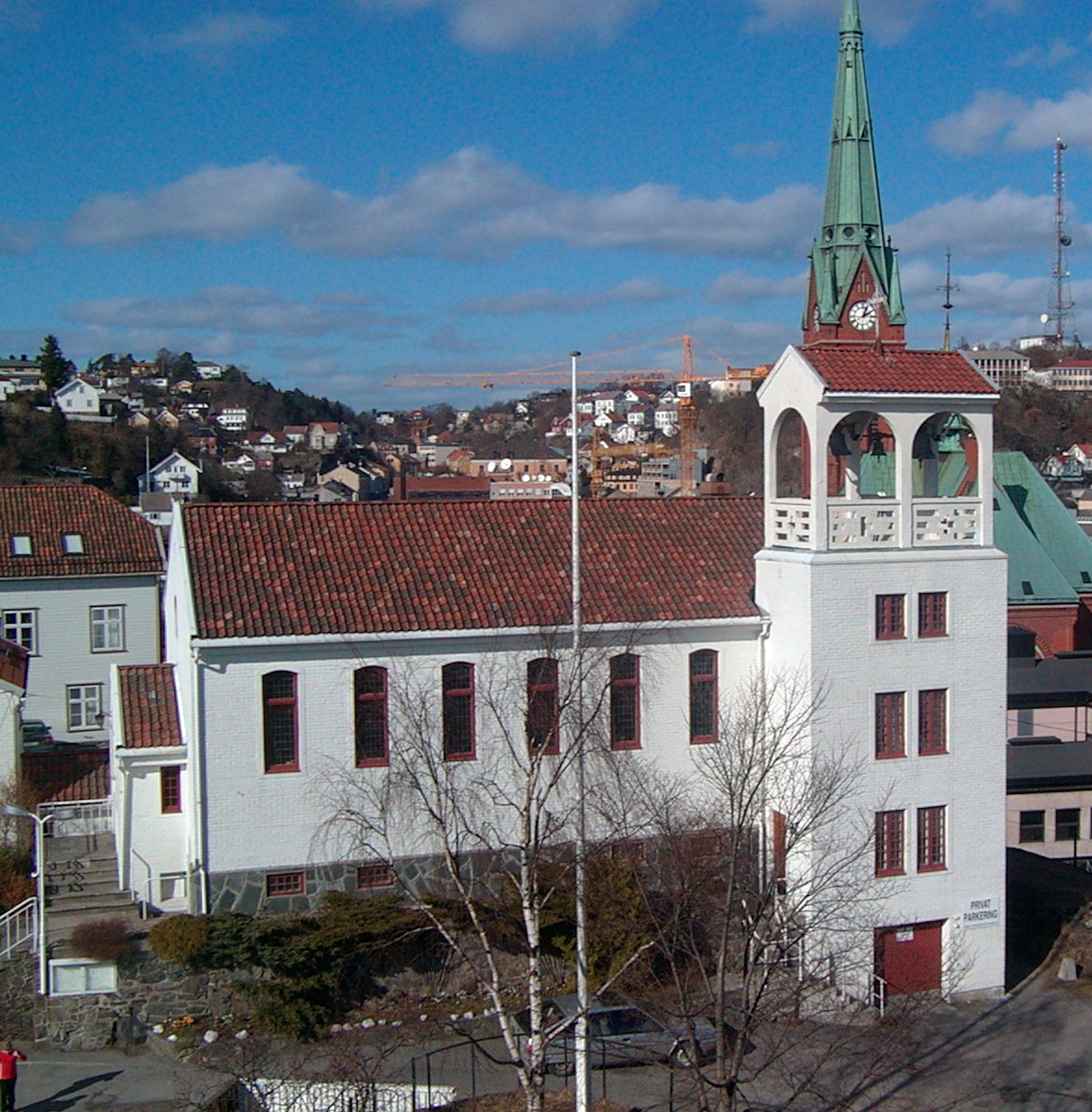 St. Franciskus Xaverius kirke i Arendal